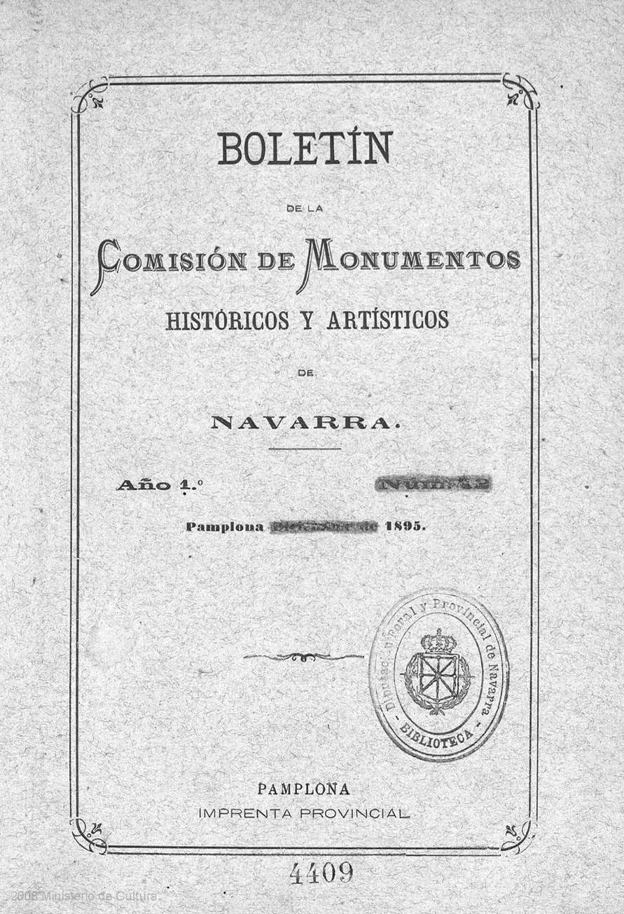 Portada del primer Boletín Comisión de Monumentos Históricos y Artísticos de Navarra